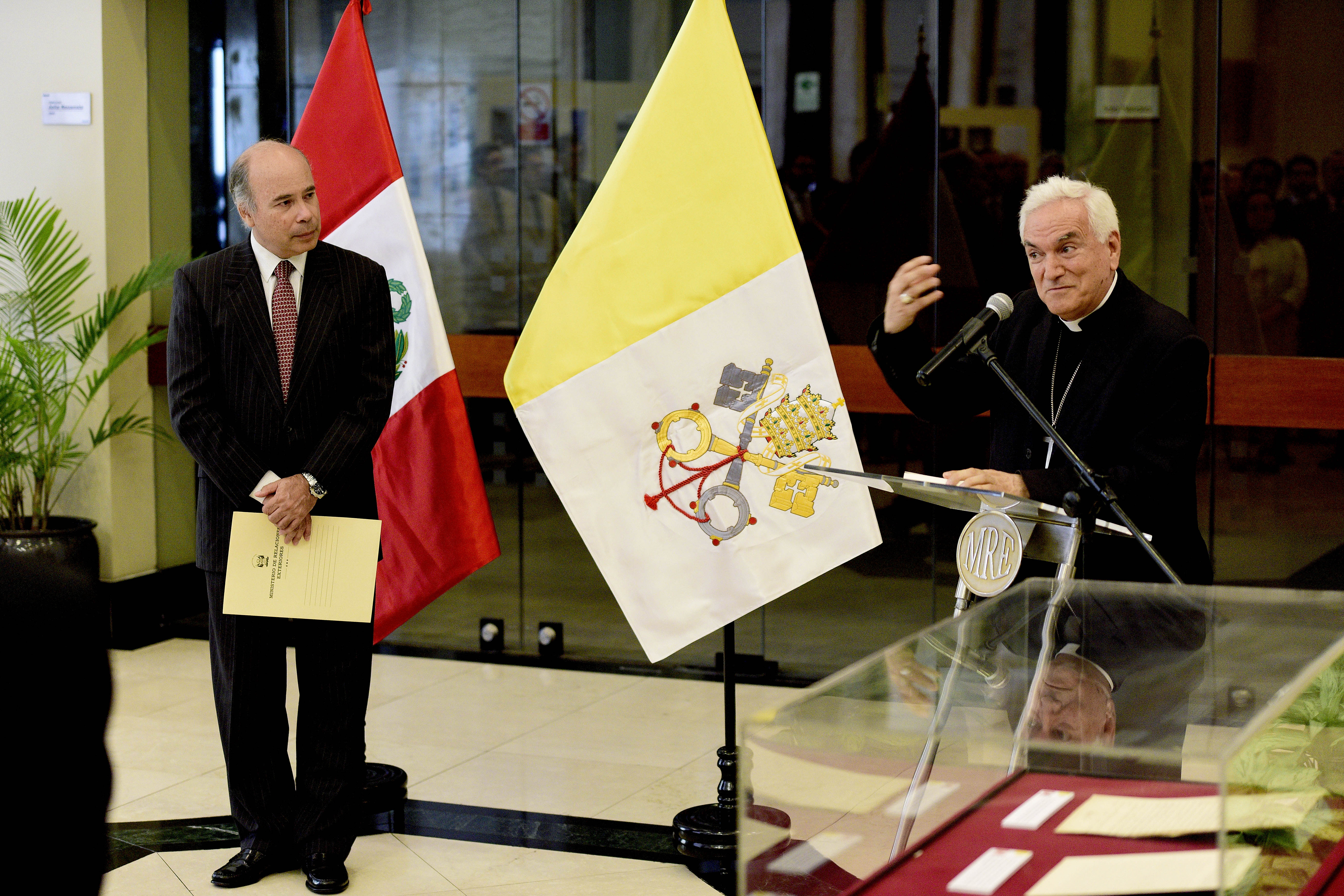 ​En la sede de la Cancillería, fue inaugurada la Muestra Documental “Las Relaciones entre el Perú y la Santa Sede”, efectuada como preludio a la próxima Visita Apostólica de Su Santidad el Papa Francisco al Perú, del 18 al 21 de enero de 2018. La ceremonia fue encabezada por el Secretario General del Ministerio de Relaciones Exteriores, Embajador Eric Anderson, y contó con la asistencia de Su Excelencia Reverendísima Monseñor Nicola Girasoli, Nuncio Apostólico de Su Santidad en el Perú, miembros del Cuerpo Diplomático y representantes del clero peruano.